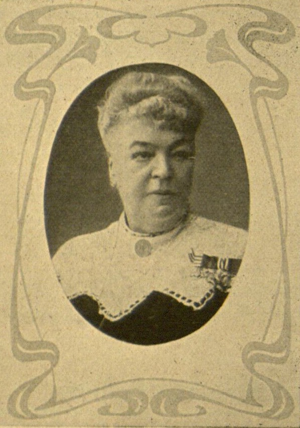 Fotografie der deutschen Schriftstellerin Wilhelmine von Hillern um 1905.